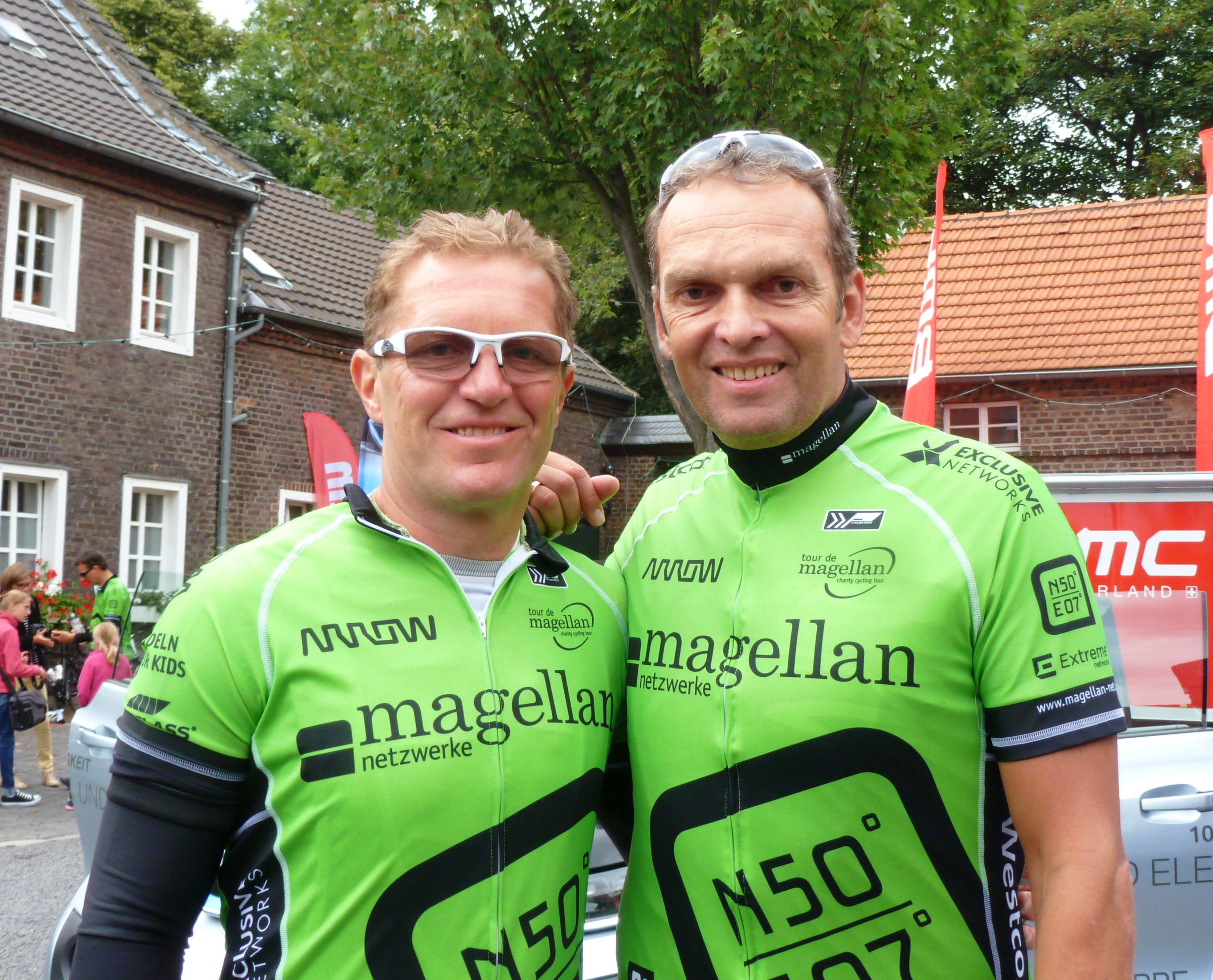 Tour de Magellan 2014, Gut Eltzhof in Köln, Jens Heppner (l.) und Olaf Ludwig